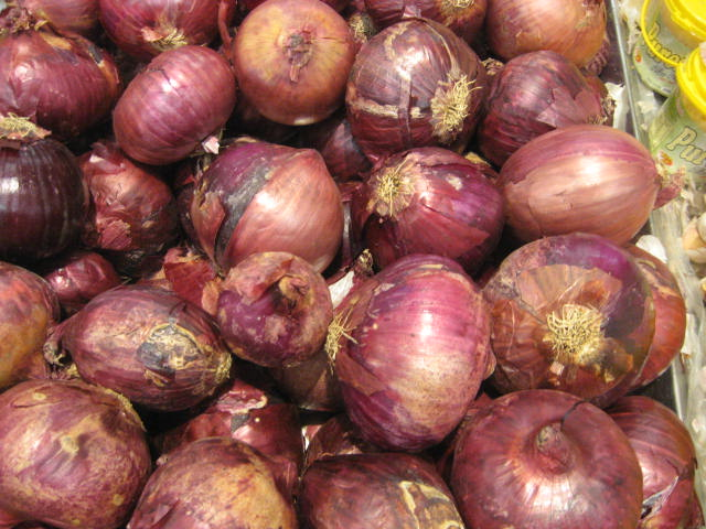 Cebola roxa